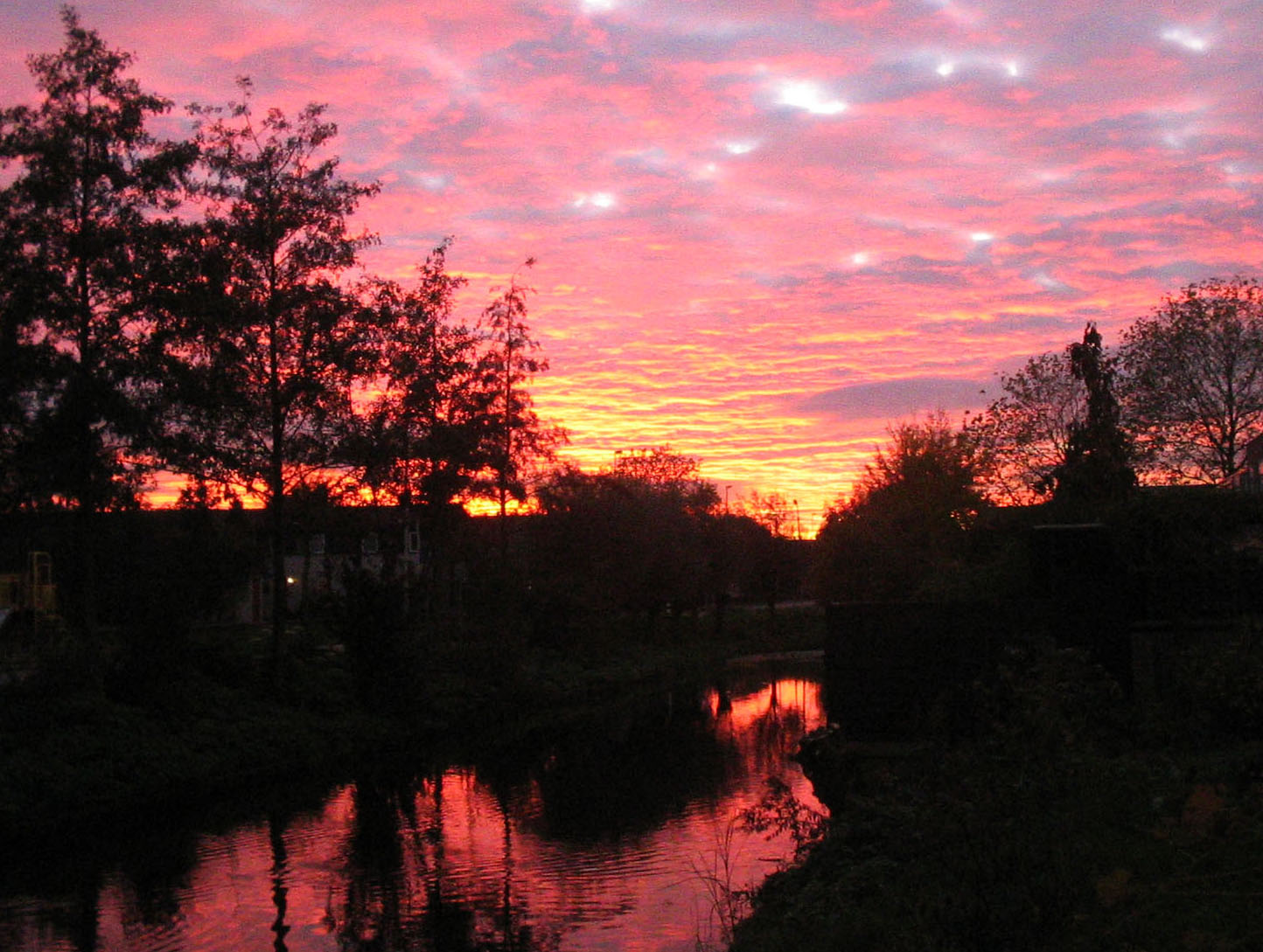 avondrood in Delft, 22 november 2005